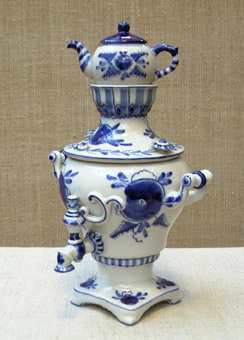 Шкатулка "Самовар".Фарфор.Гжель.Автор Людмила Азарова 1969 г.